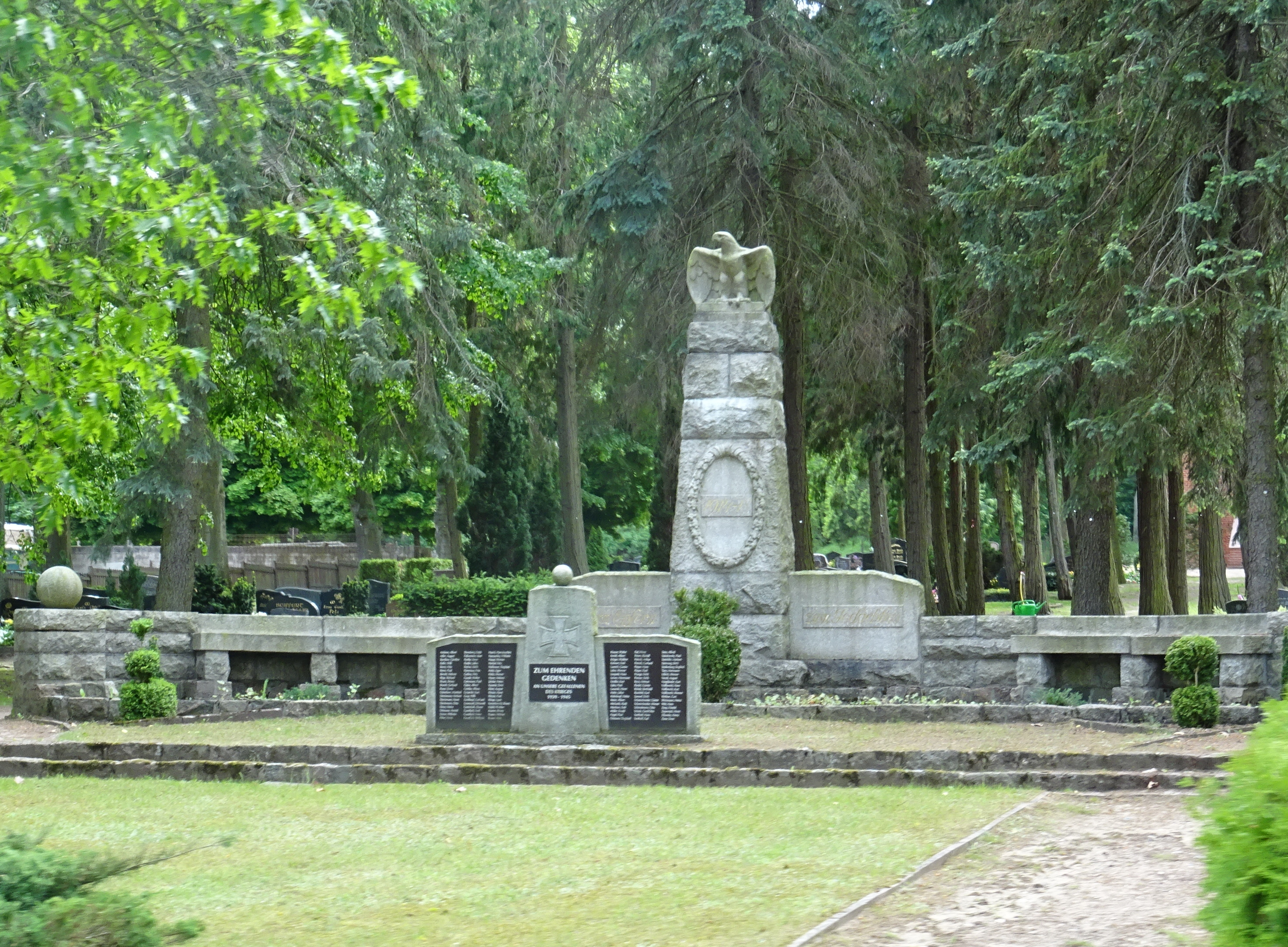 Jatznick, denkmalgeschütztes Kriegerdenkmal